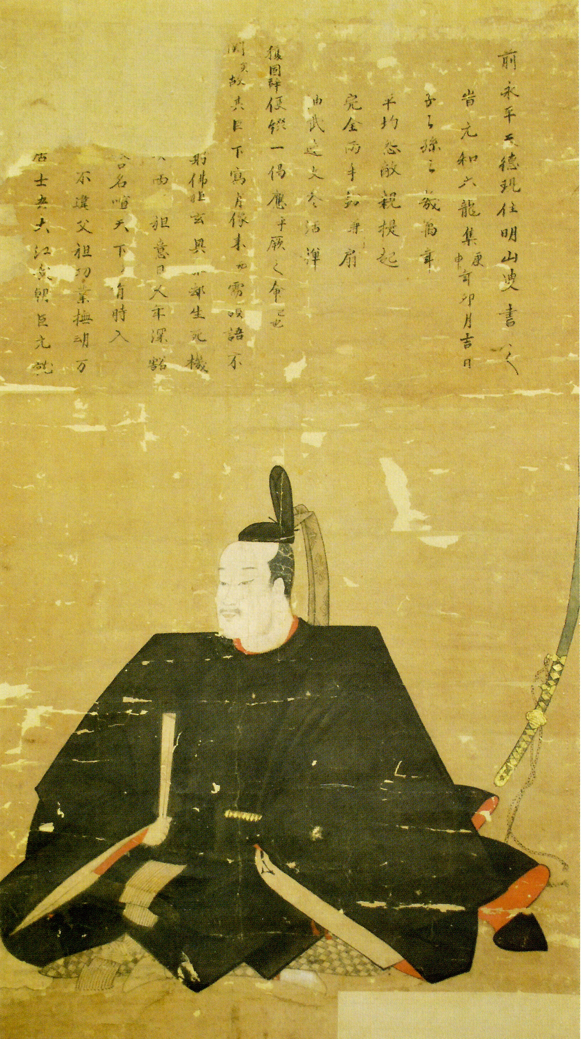 天野(毛利)元政の肖像。